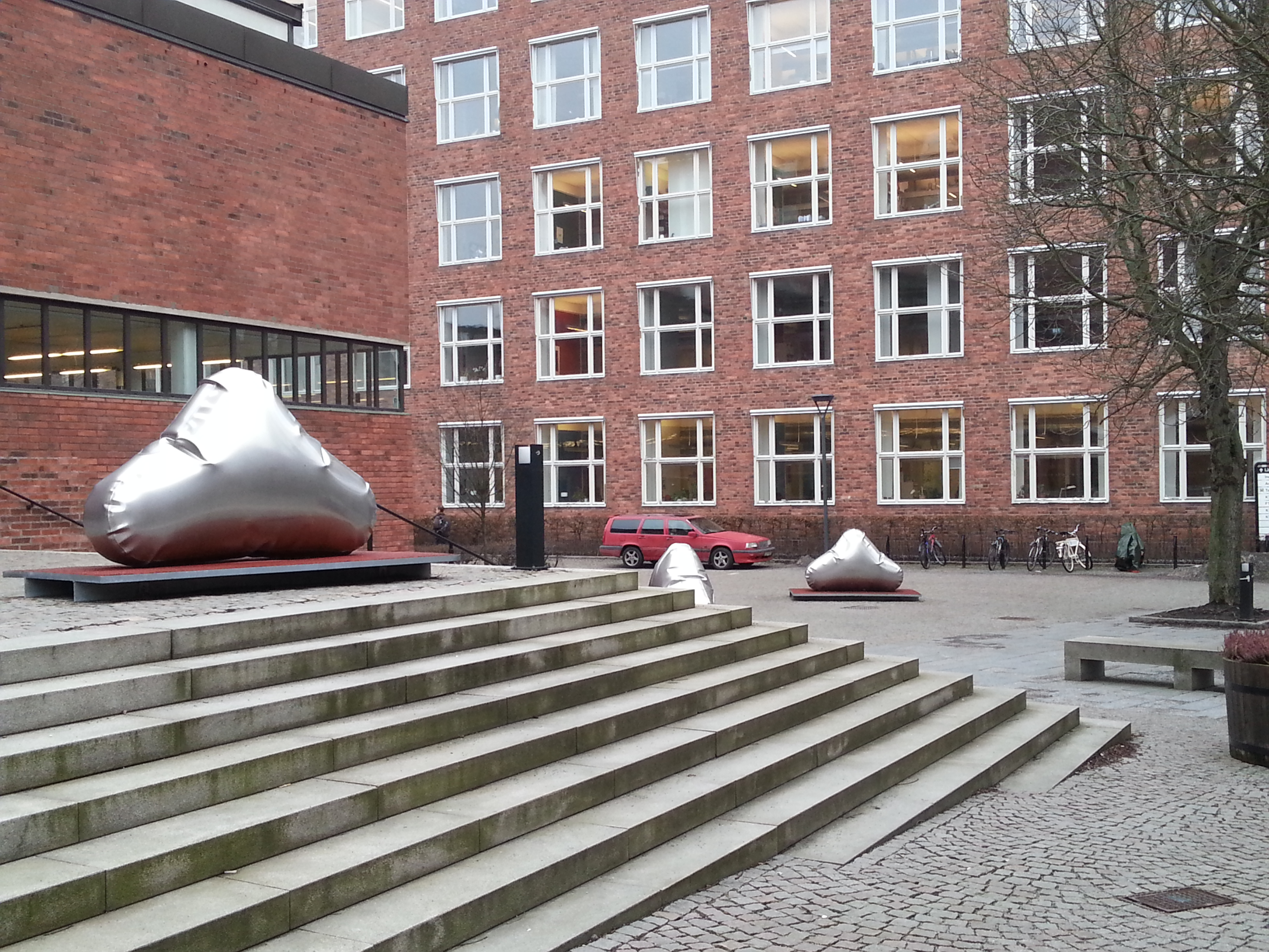 Easy rider (2004) - Thomas Karlsson It is not clear whether freedom of panorama applies to this image. This is a depiction of a work of art in Sweden. The depicted work is believed to be protected by copyright. According to Article 24 of the Swedish copyright act, "Works of art may be depicted if they are permanently placed on or at a public place outdoors. Buildings may be freely depicted." It has been widely accepted that this provision made distribution of depictions such as this one legal. On 4 April 2016, however, the Supreme Court of Sweden issued a statement that Article 24 does not extend to publication in online repositories, and on 6 July 2017, a lower court ruled that linking to depictions of copyrighted artworks hosted on Commons constitutes copyright infringement. See COM:CRT/Sweden#Freedom of panorama for more information. The implications of these decisions on Commons' ability to continue to distribute this and other depictions like it are currently under analysis. Reusing or linking to this file may have legal consequences. You are solely responsible for ensuring that you do not infringe the copyright belonging to someone else. See our general disclaimer for more information.